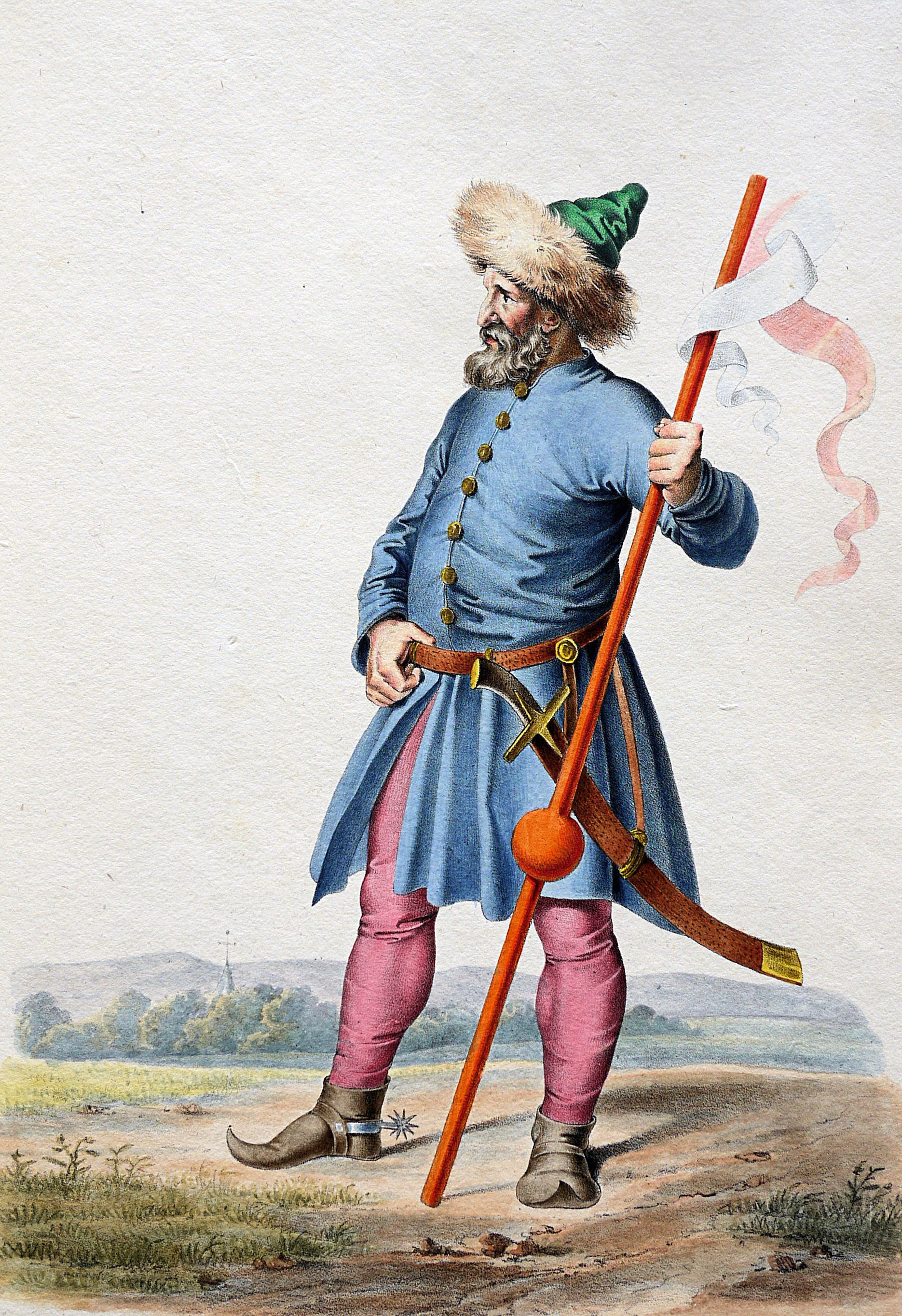 Géza (940-997), Großherzog von Ungarn (972-997) aus dem Geschlecht der Arpaden. Lithographie von Josef Kriehuber nach einer Zeichnung von Moritz von Schwind aus Ungerns Erste Heerführer Herzoge und Koenige In einer Reihe von Bildnissen von Bela bis auf Seine Majestät Franz I. Kaiser Von Österreich König Von Ungern &c., &c. Wien : Lithographisches Institut ;ca. 1828